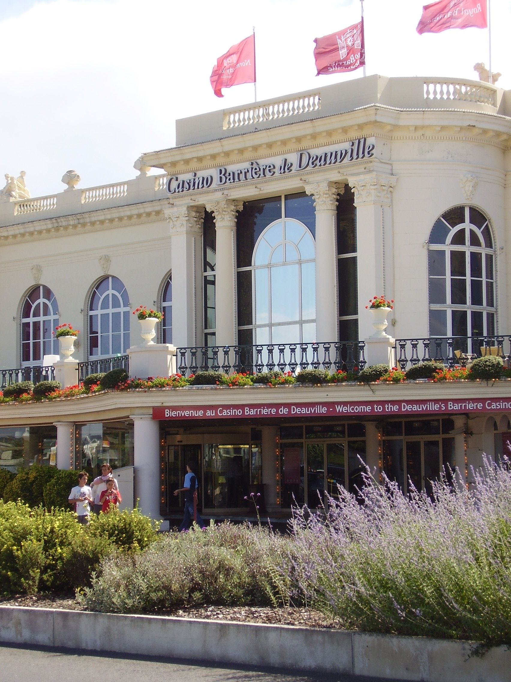 Deauville, Frankreich